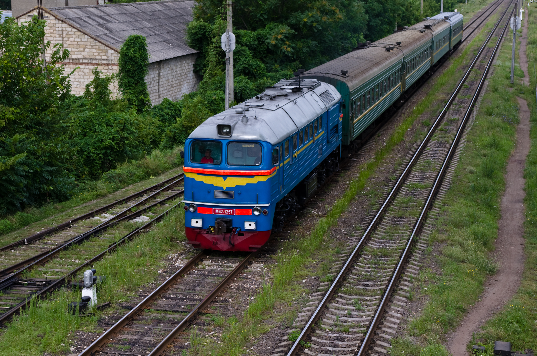 Ruta Chişinău-Odessa prin Tiraspol